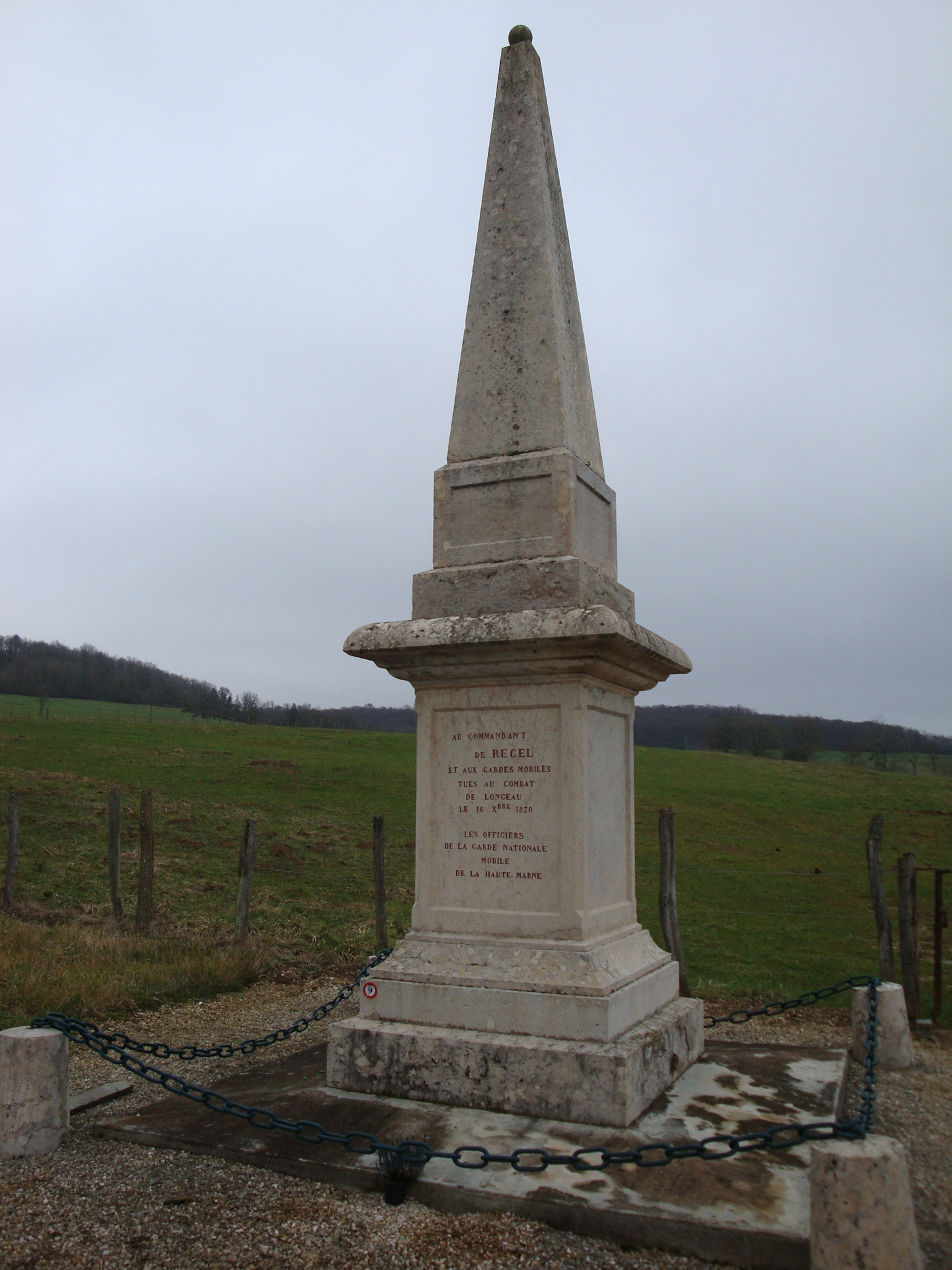 Stèle des Mobiles